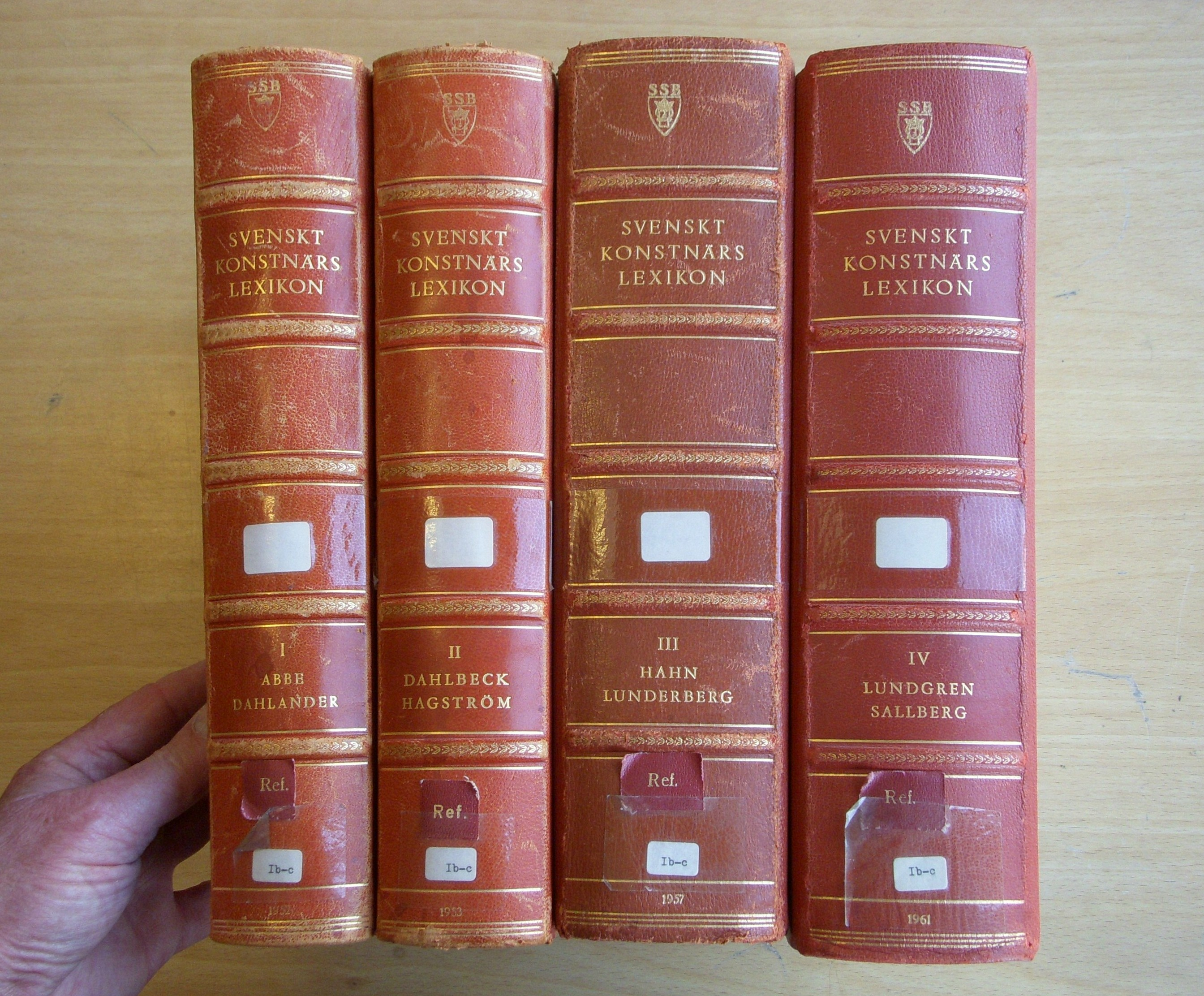 Svenskt Konstnärslexikon, band I-IV från 1967